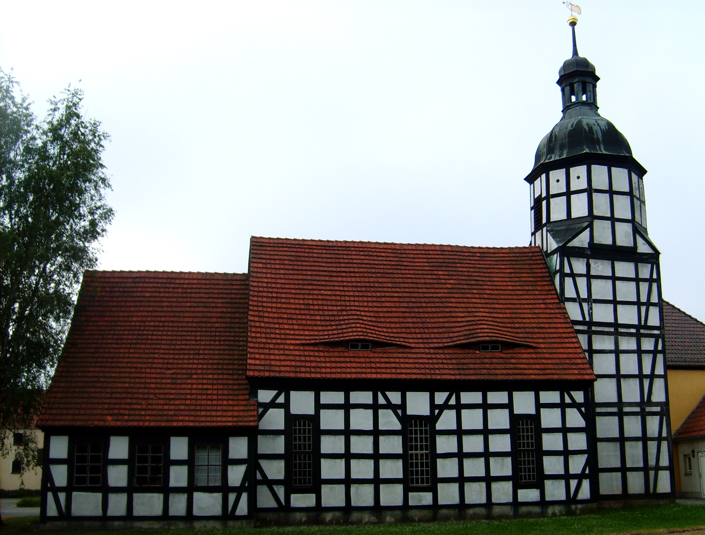 Fachwerkkirche in Saathain, Deutschland.